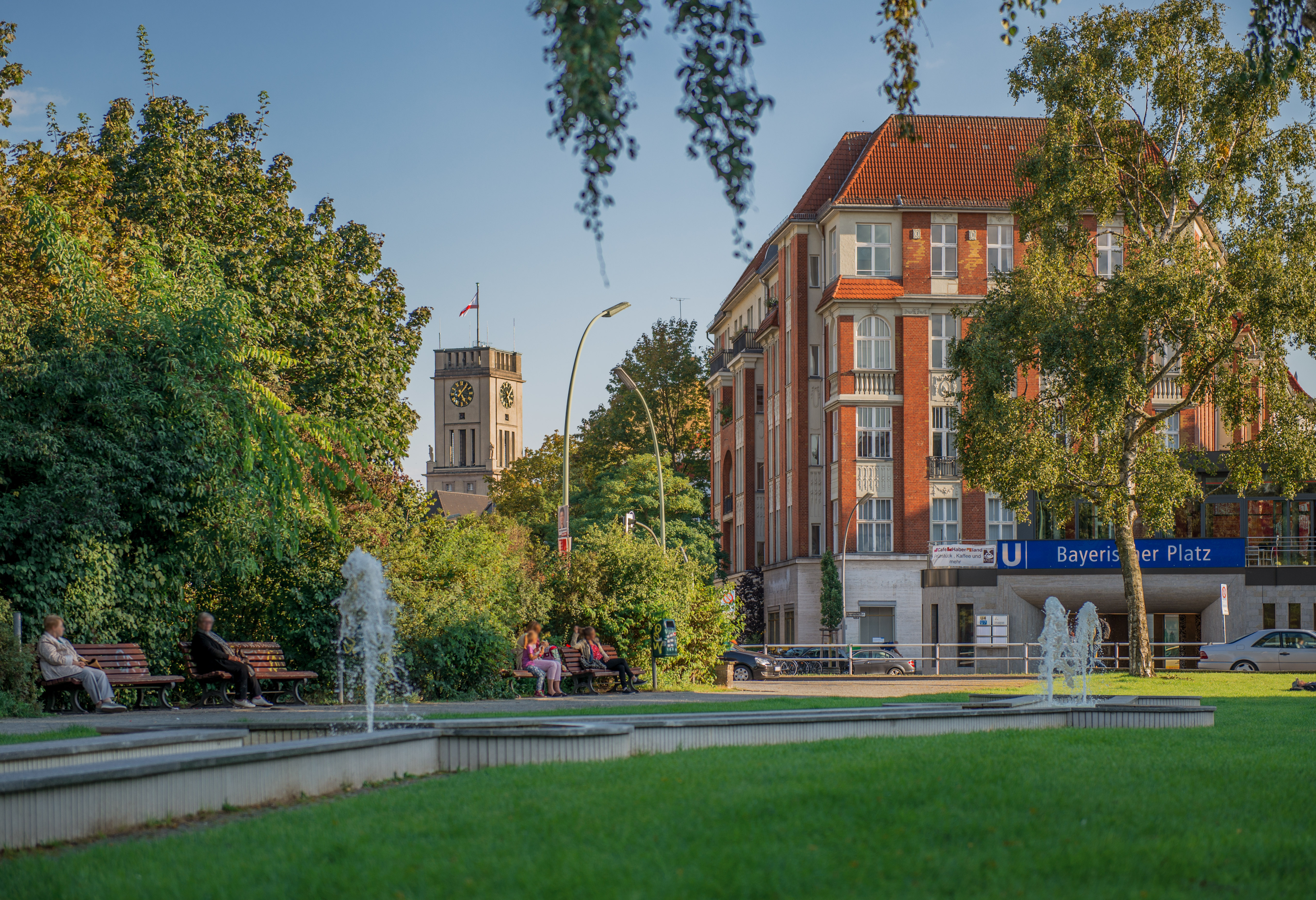 Der Bayerischer Platz (Rathaus Schöneberg im Hintergrund)